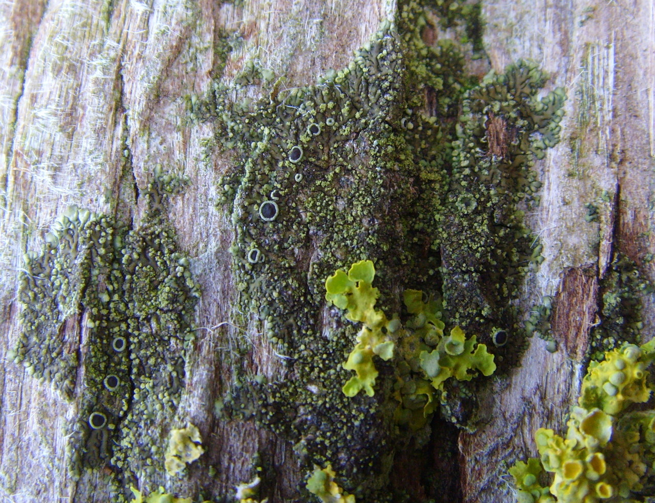 Hyperphyscia adglutinata, Custrein (Esquibien, Finistère, Bretagne, France)